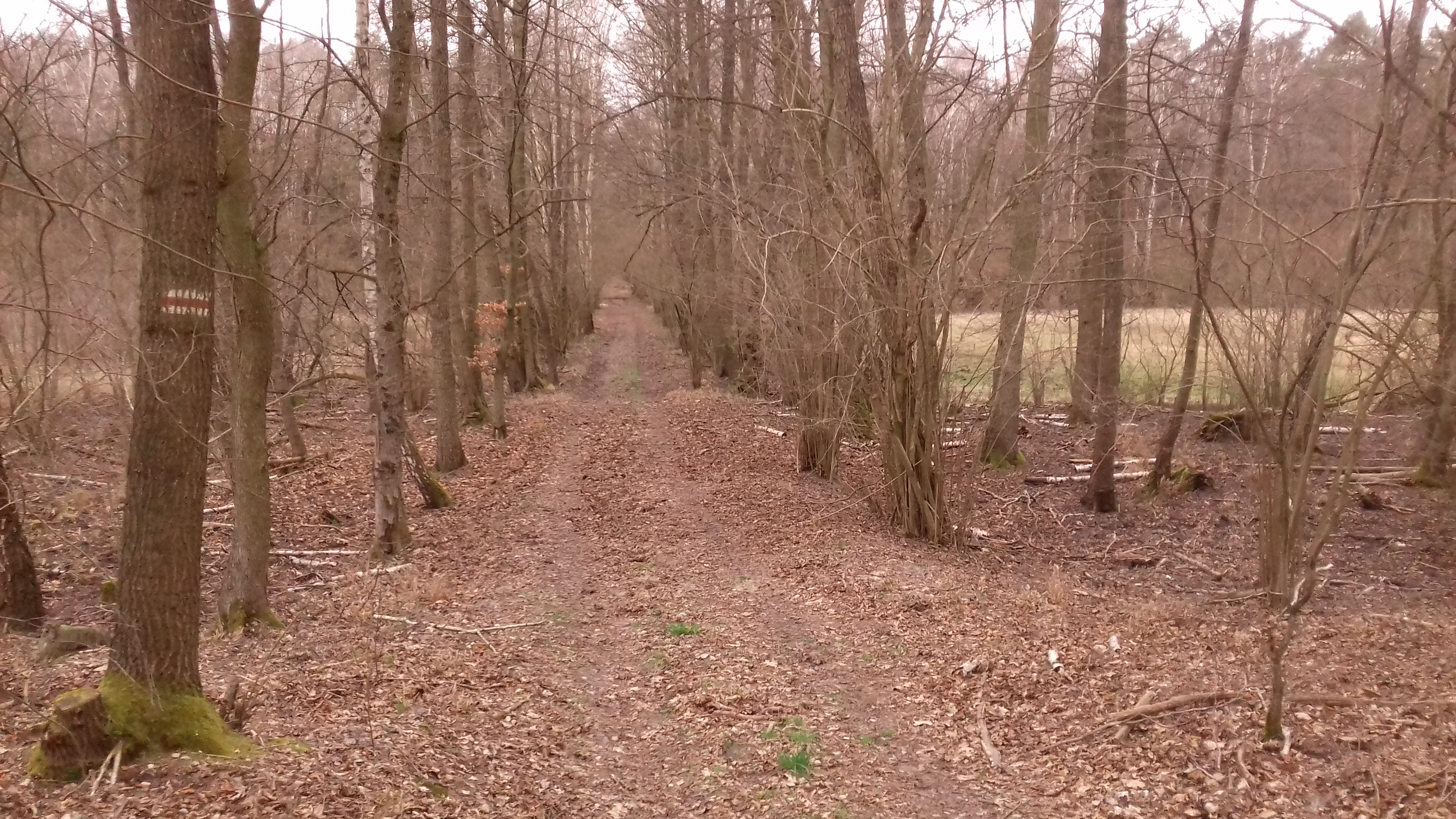 Szlak pieszy nr 3578 (czerwony) w kompleksie leśny na południe od Rezerwatu Krajkowo